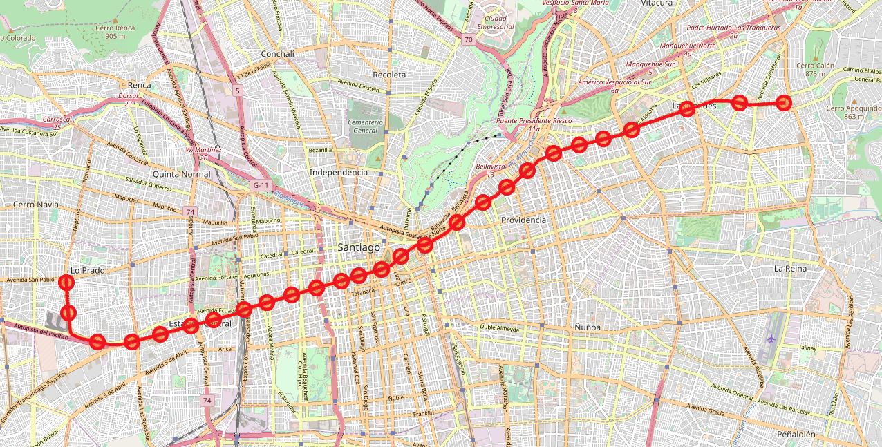 Mapa con el recorrido de la Línea 1 del Metro de Santiago